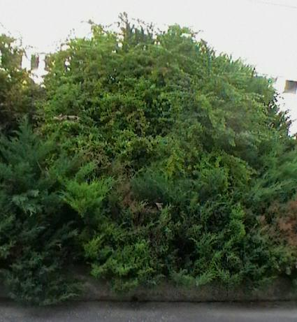 Berberis thunb.